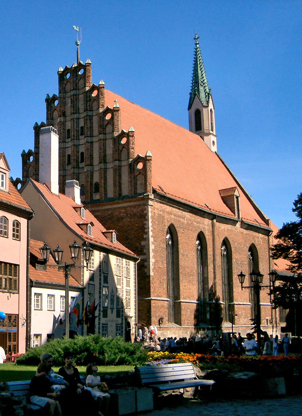 Johanneskirche in Riga